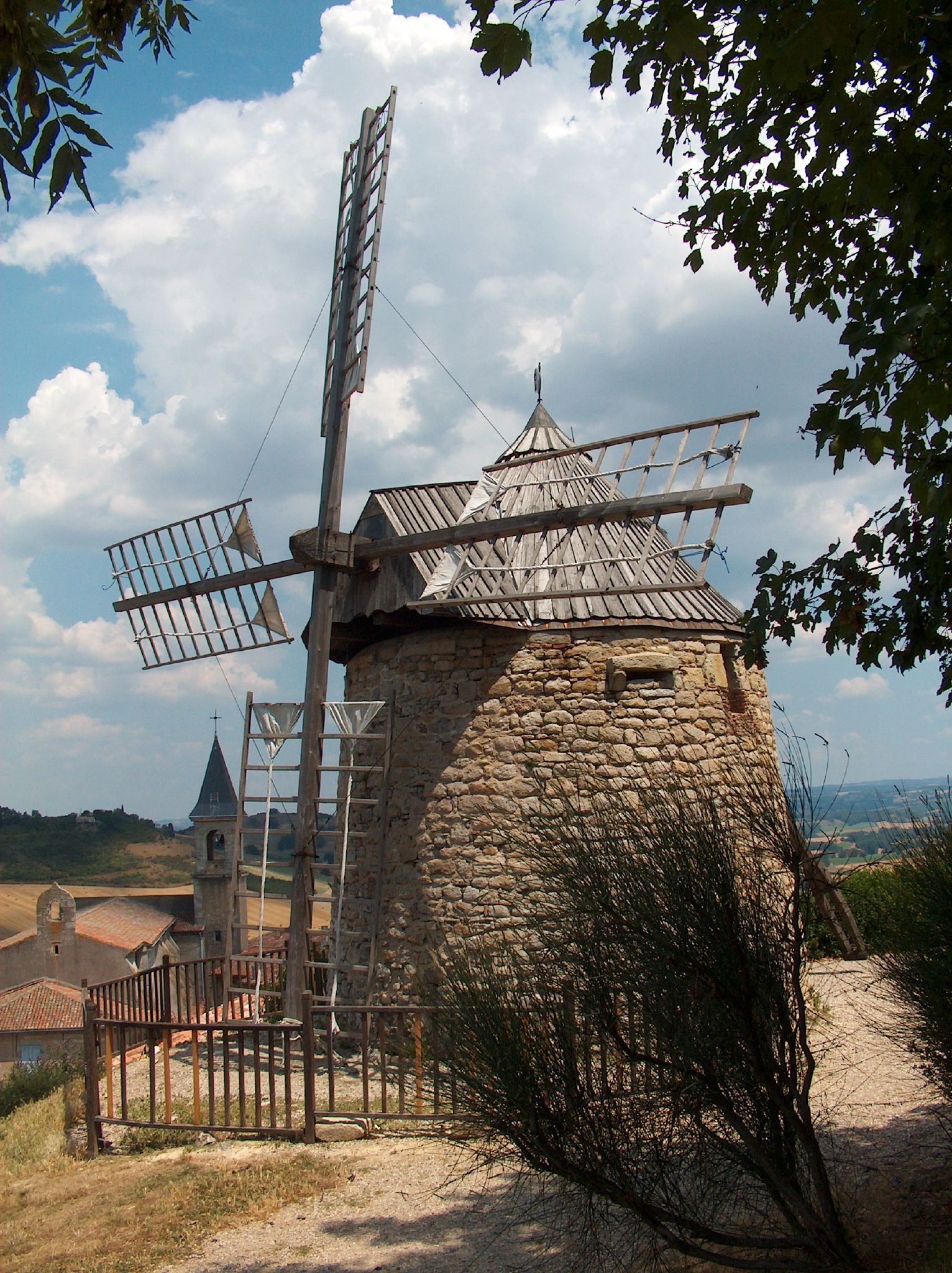 Moulin de Lautrec